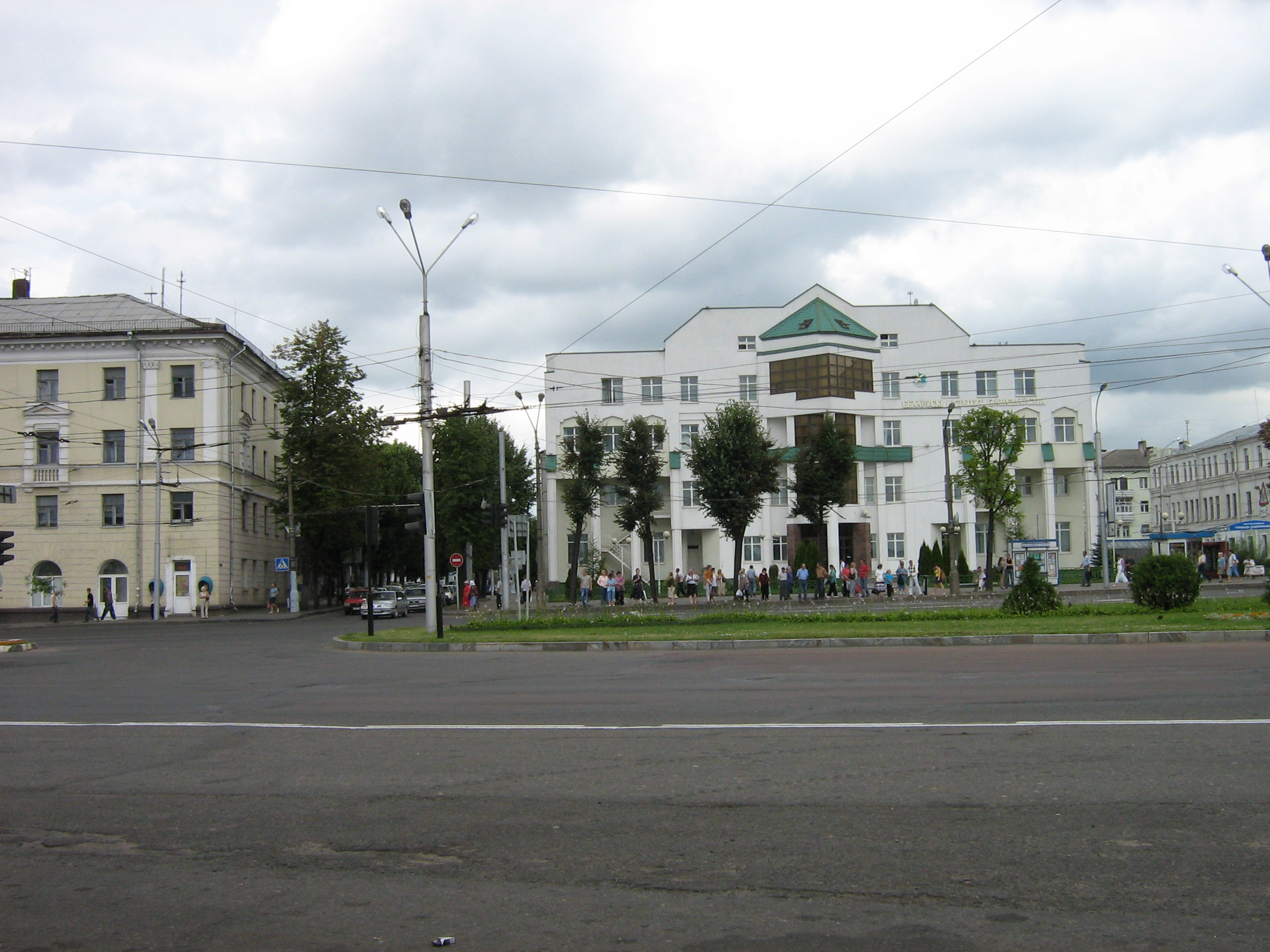 Могилев. Пл. Орджоникидзе.